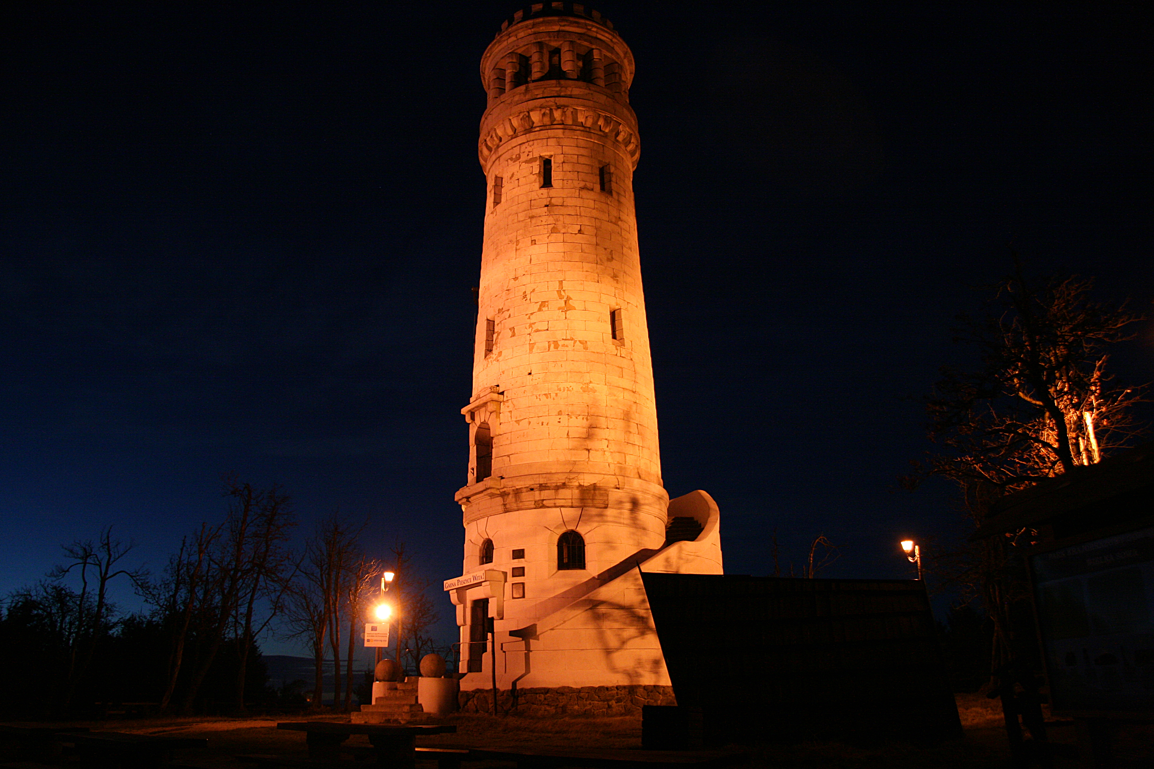 Wieża widokowa na Wielkiej Sowie po zmroku